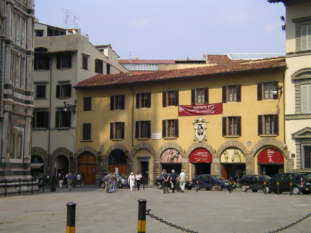 Opera del Duomo Museum, Museo in in Florence, Italy